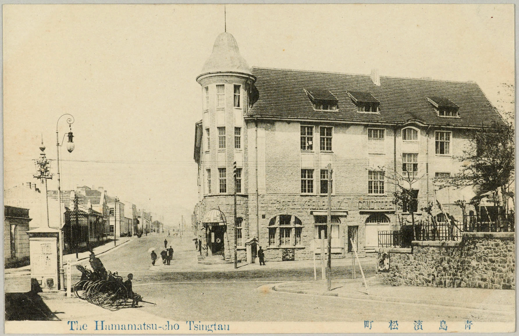 青岛奥托商业楼旧址